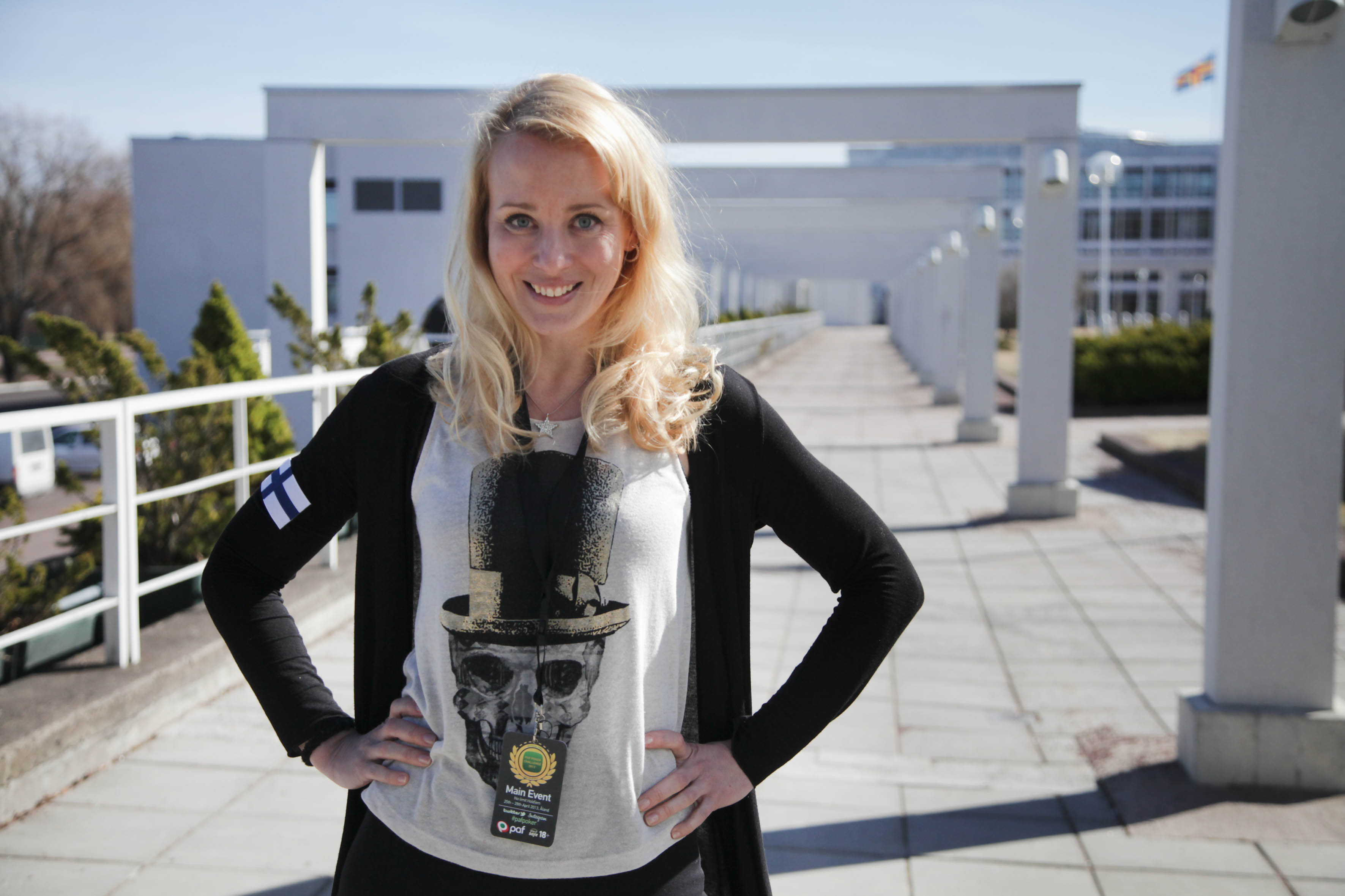 Noora Karma at Paf Poker Challenge 2013